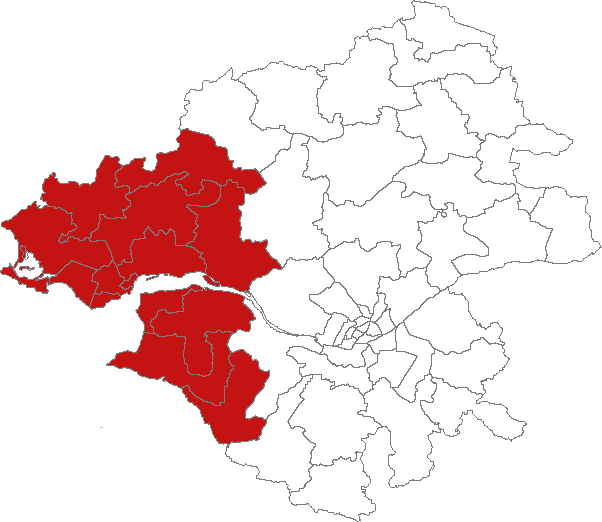 Carte de localisation de l'arrondissement de Saint-Nazaire (France, Loire-Atlantique)